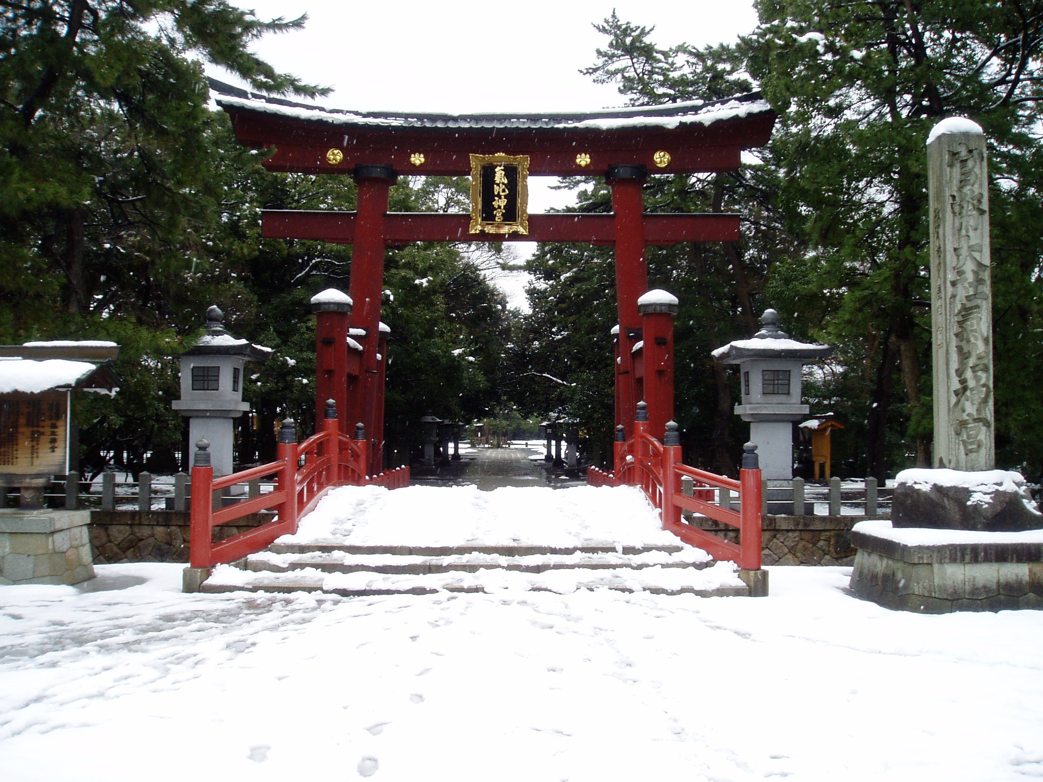 the Great Torii (O Torii; 大鳥居) at Kehi Jingu (氣比神宮) in Tsuruga, Fukui, Japan.